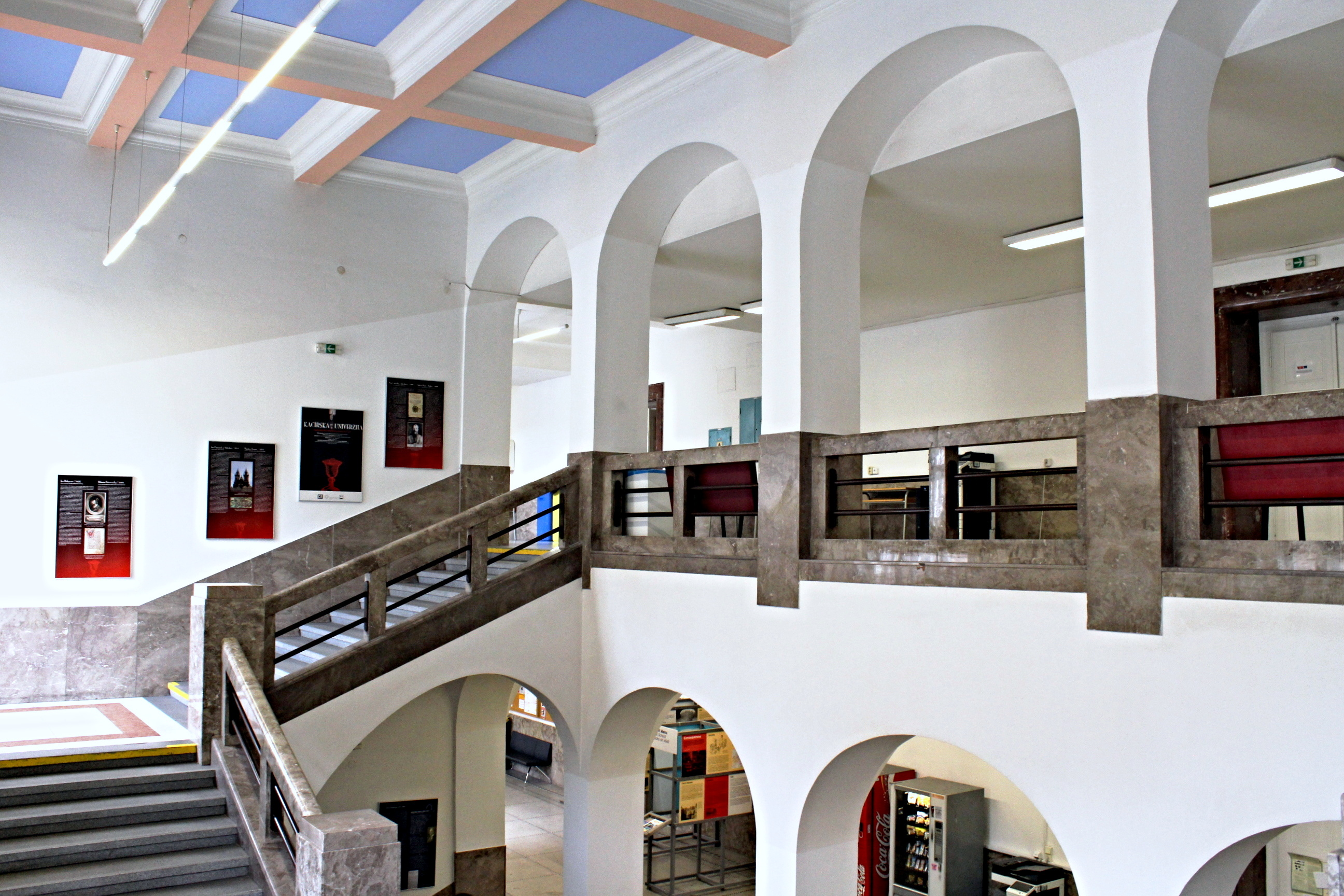 Interiér Filosofické fakulty UK